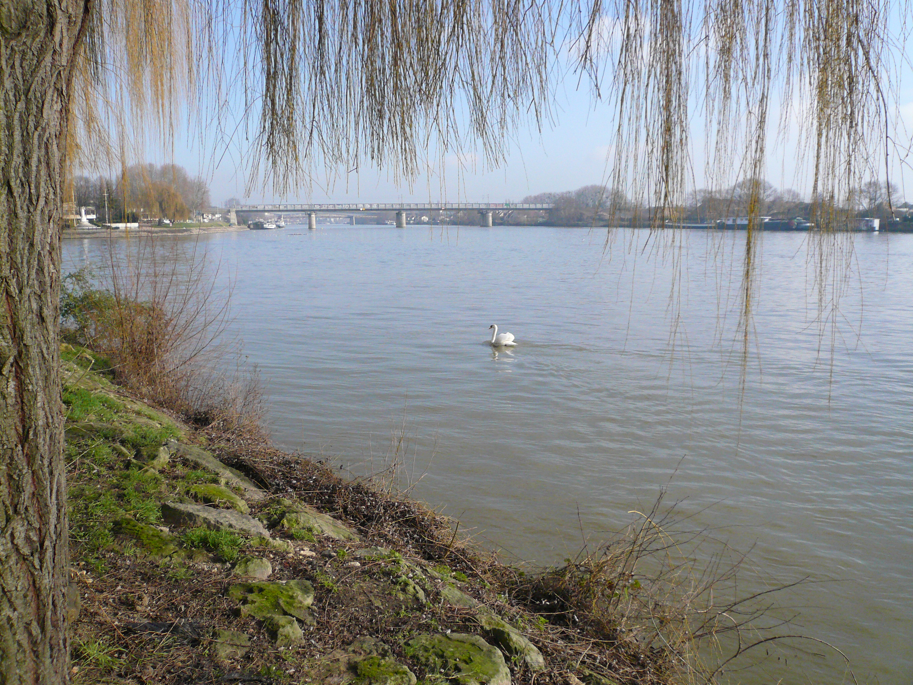 Andresy, quai de Seine. A gauche on remarque les eaux de l'Oise qui viennent se jeter dans la Seine. Dans le fond le pont ferroviaire du RER A sur la Seine, et la ville de Conflans-Sainte-Honorine.